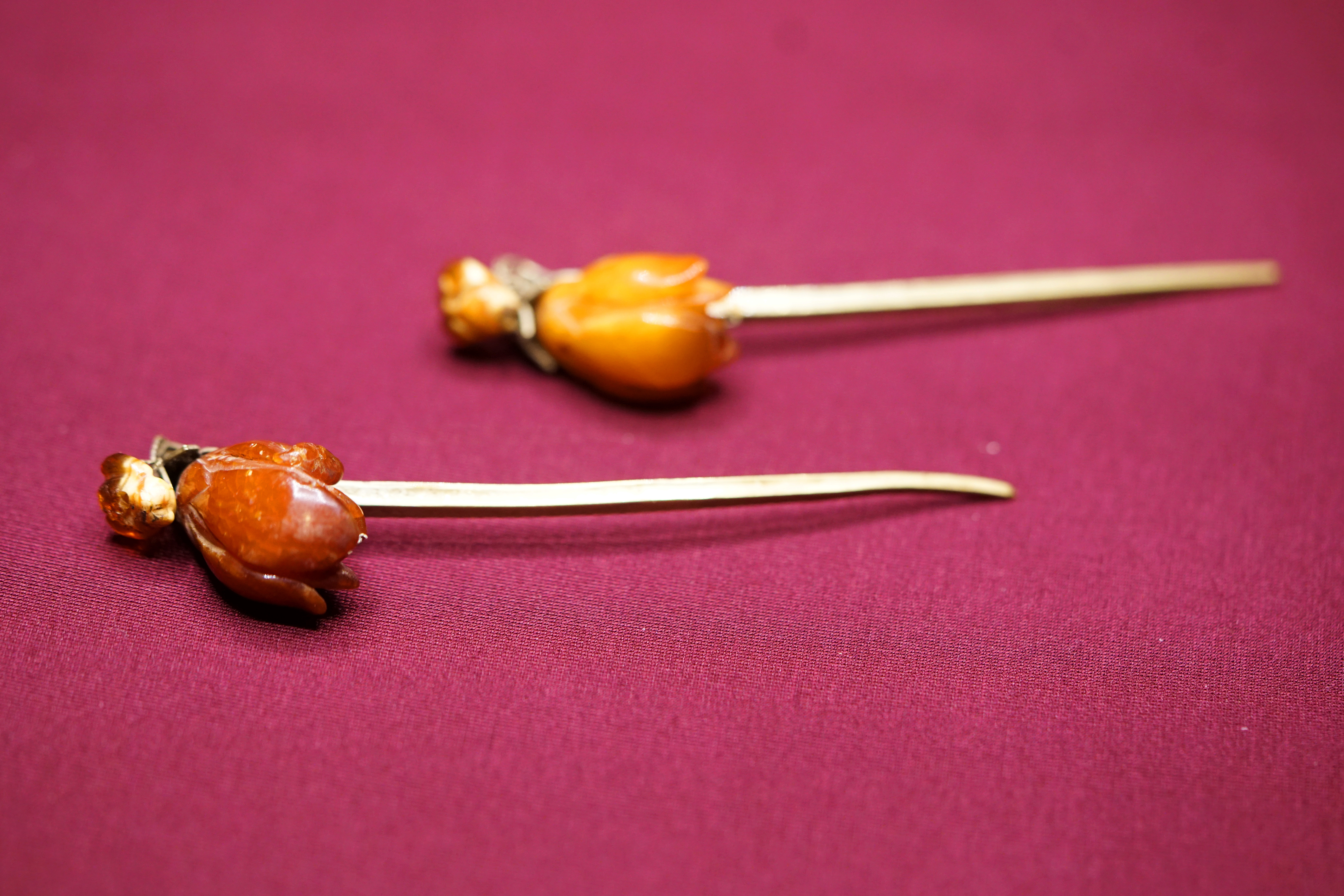 中文（中国大陆）: 玛瑙佛手形金簪 明 南京江宁将军山沐启元墓出土。簪首较大的花以填丝技法做成六瓣花萼，其上镶嵌雕成佛手状的玛瑙。佛手即“佛手柑”。“佛手”与“福”谐音